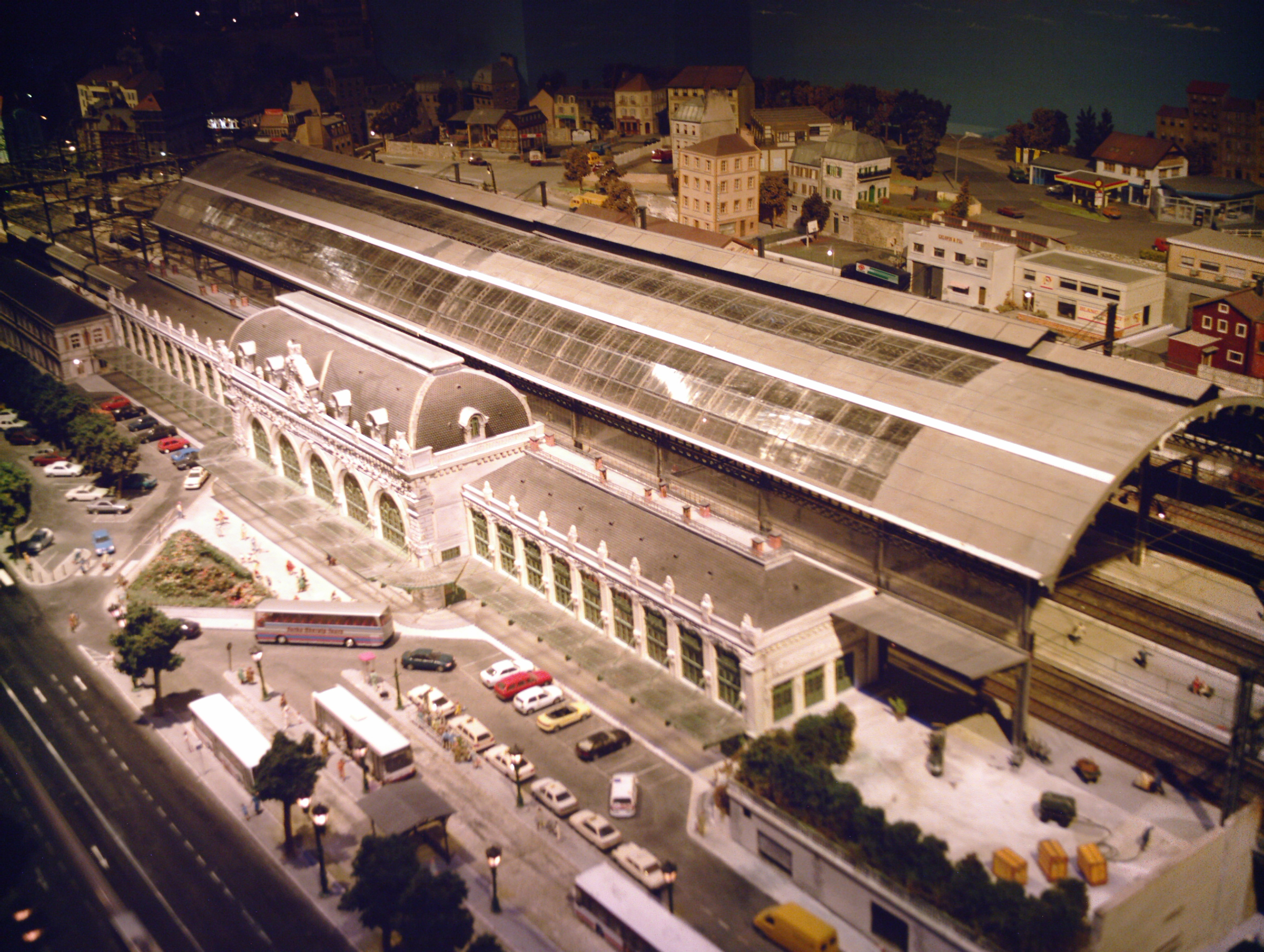 Reconstitution de la gare des Brotteaux, au musée du train miniature de Châtillon-sur-Chalaronne (Ain, FRANCE)